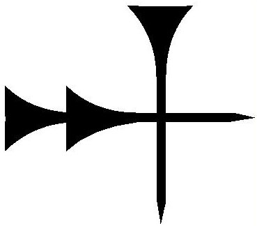 Óasszír írásjel: an, U+1202D